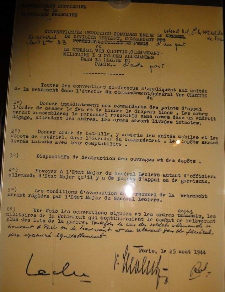 Reddition de la garnison allemande de Paris en août 1944 signé par le général Leclerc, Musée Militaire, Aux Invalides.